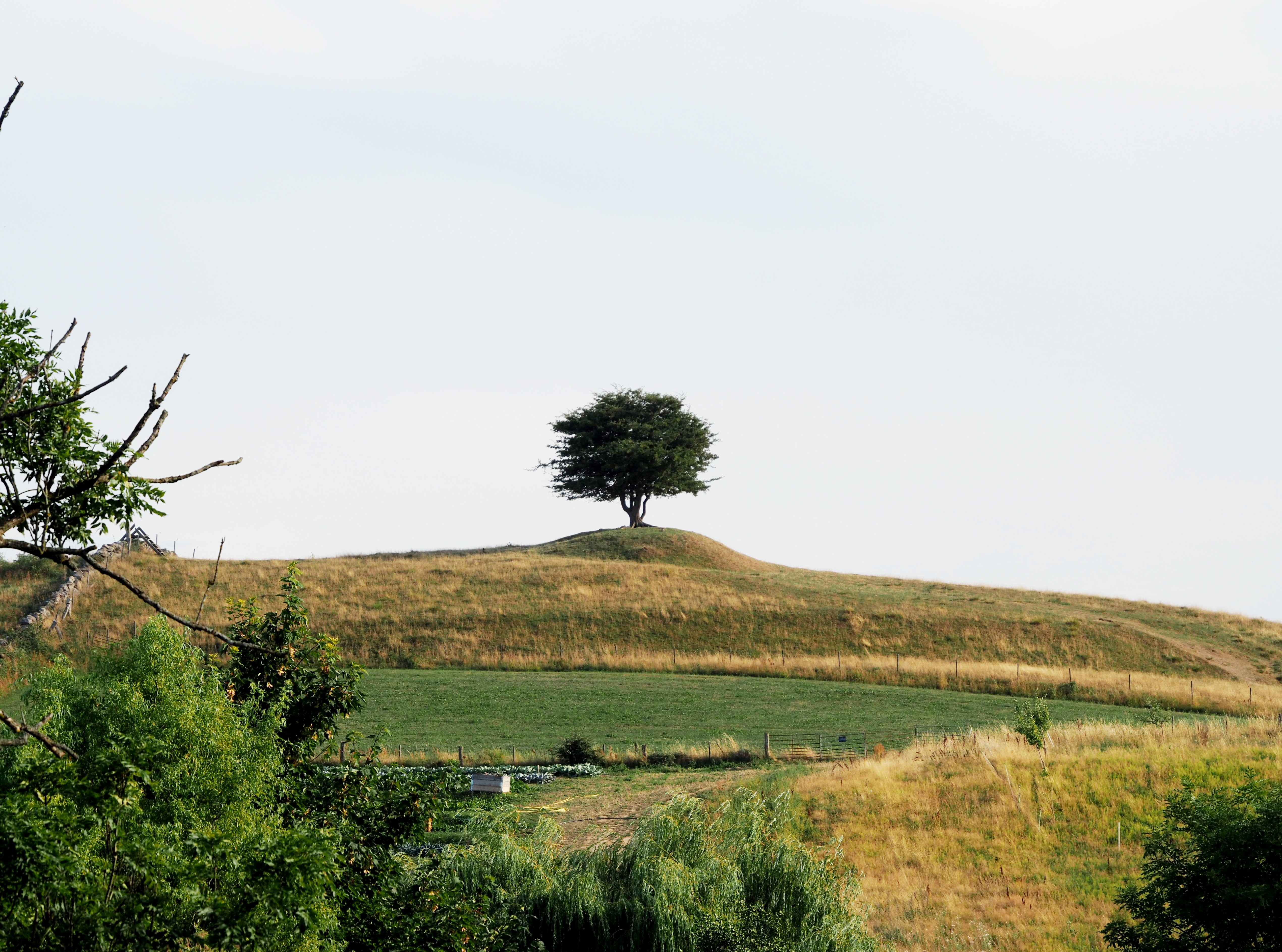 Skallahögbjär, höjd i Rörum, Simrishamns kommun, Skåne